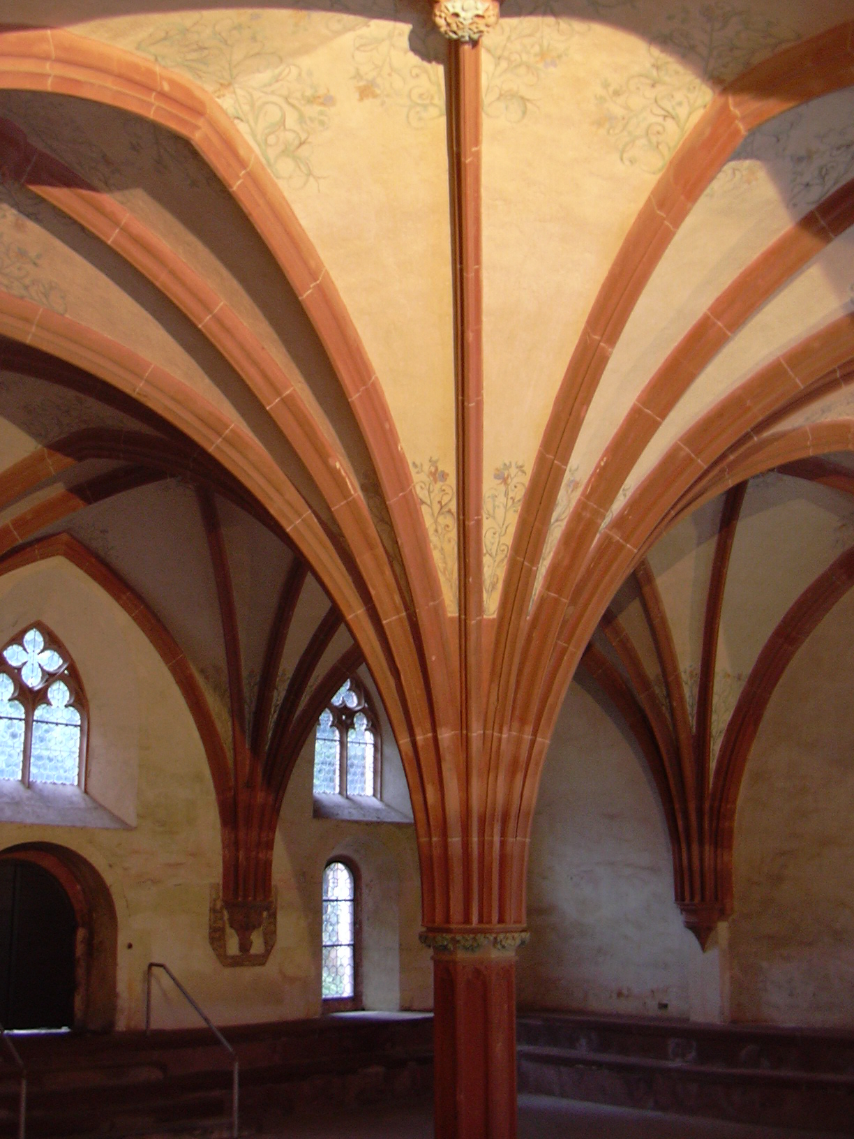 Kapitelsaal Kloster Eberbach